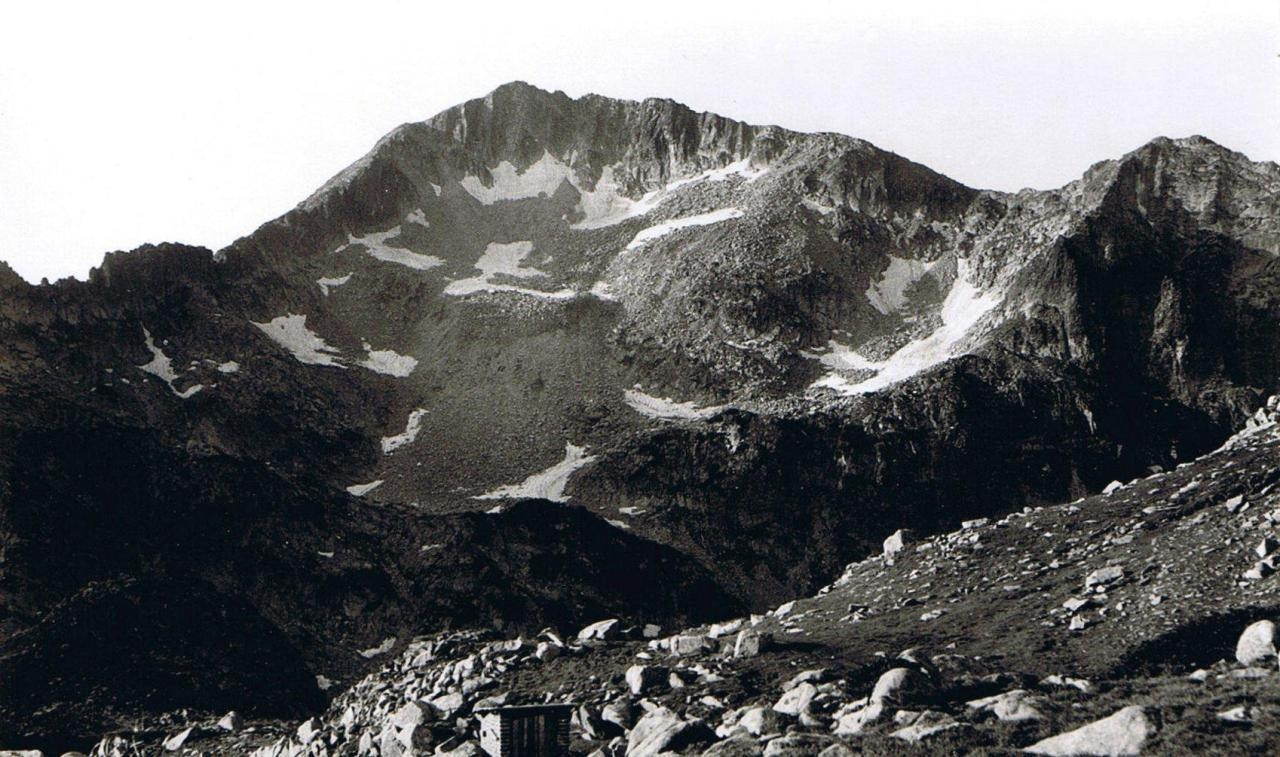 Връх Каменица е петият по височина връх в Пирин, висок 2822 м (България).